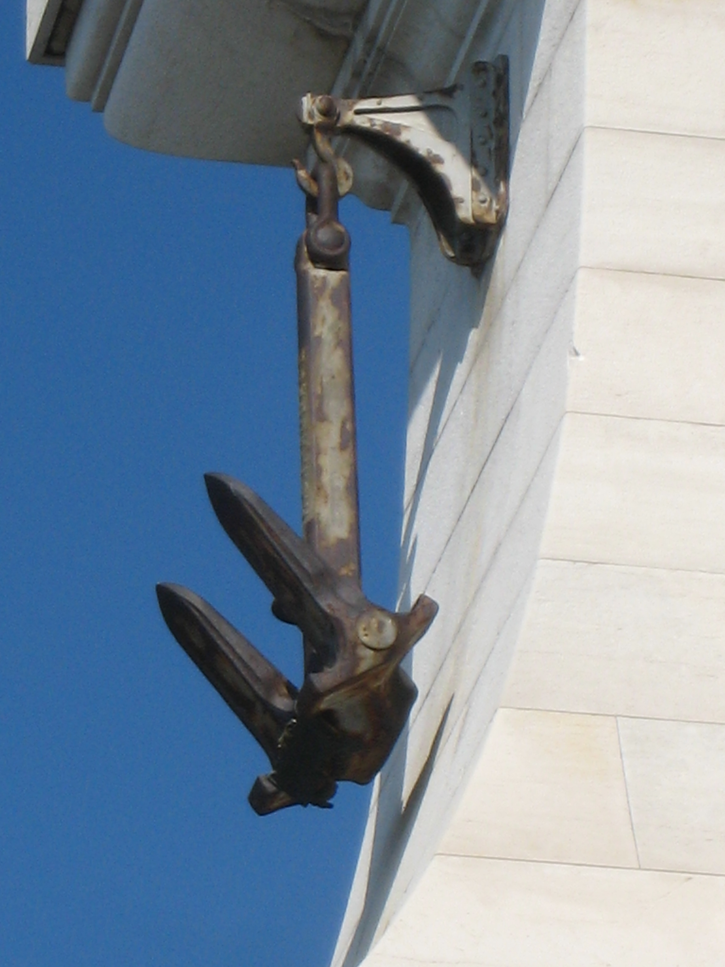 L'ancora del cacciatorpediniere Audace alla base del faro della Vittoria di Trieste 19-10-2008